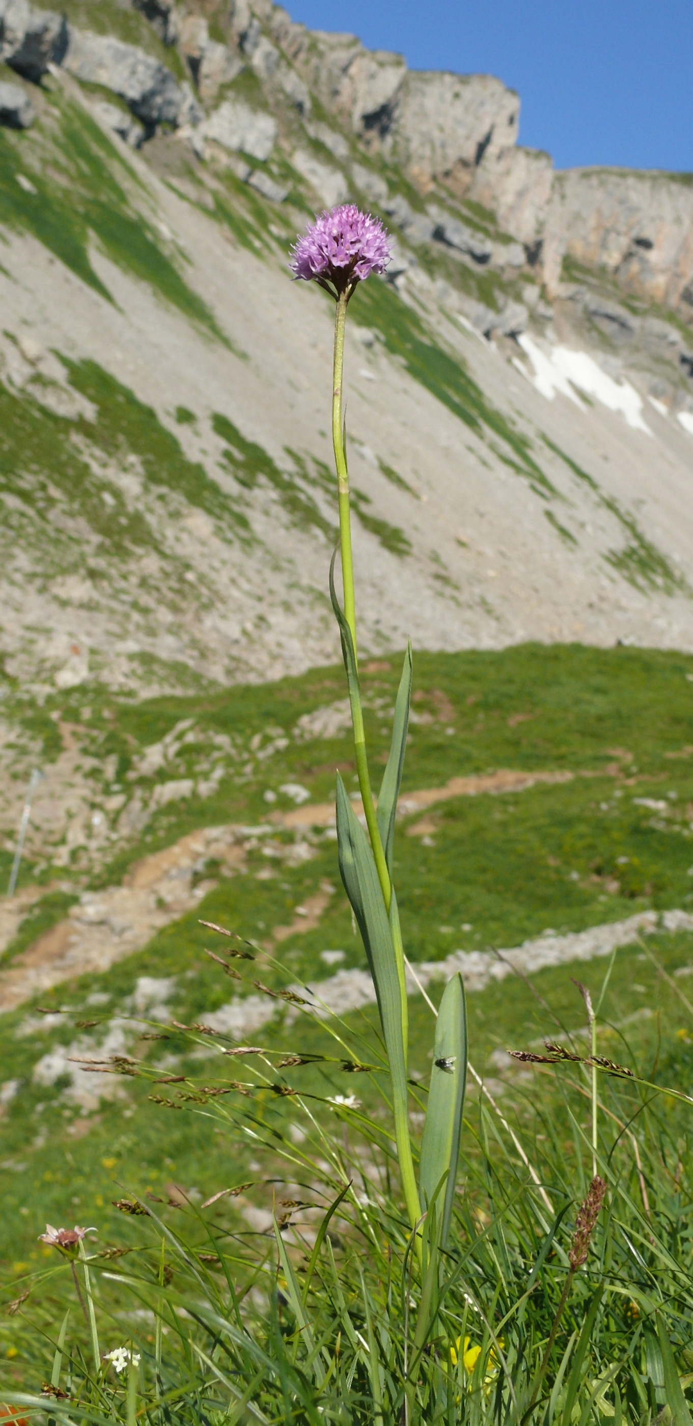 Traunsteinera globosa, Allgäuer Alpen, Österreich